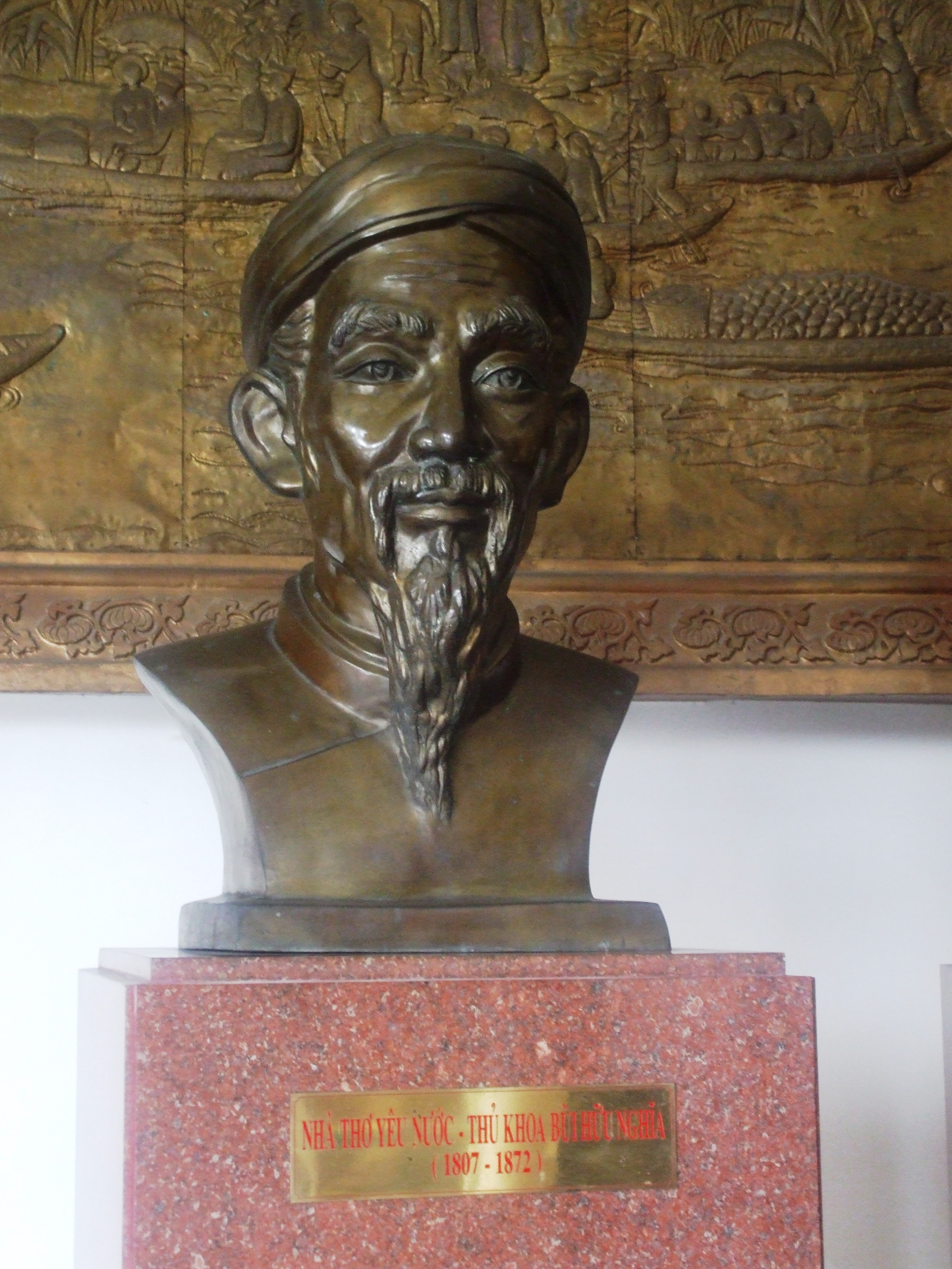 Tượng nhà thơ Bùi Hữu Nghĩa trong Bảo tàng Cần Thơ (VIệt Nam).